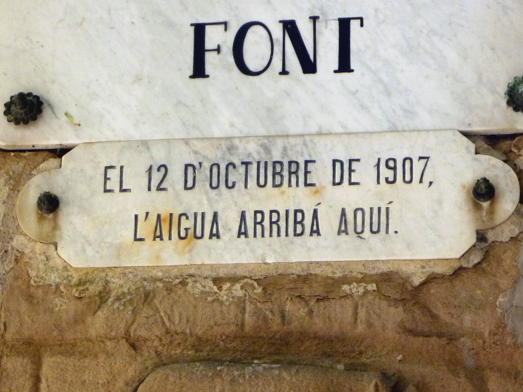 Font de la Vila de Torà: indicador d'una riuada